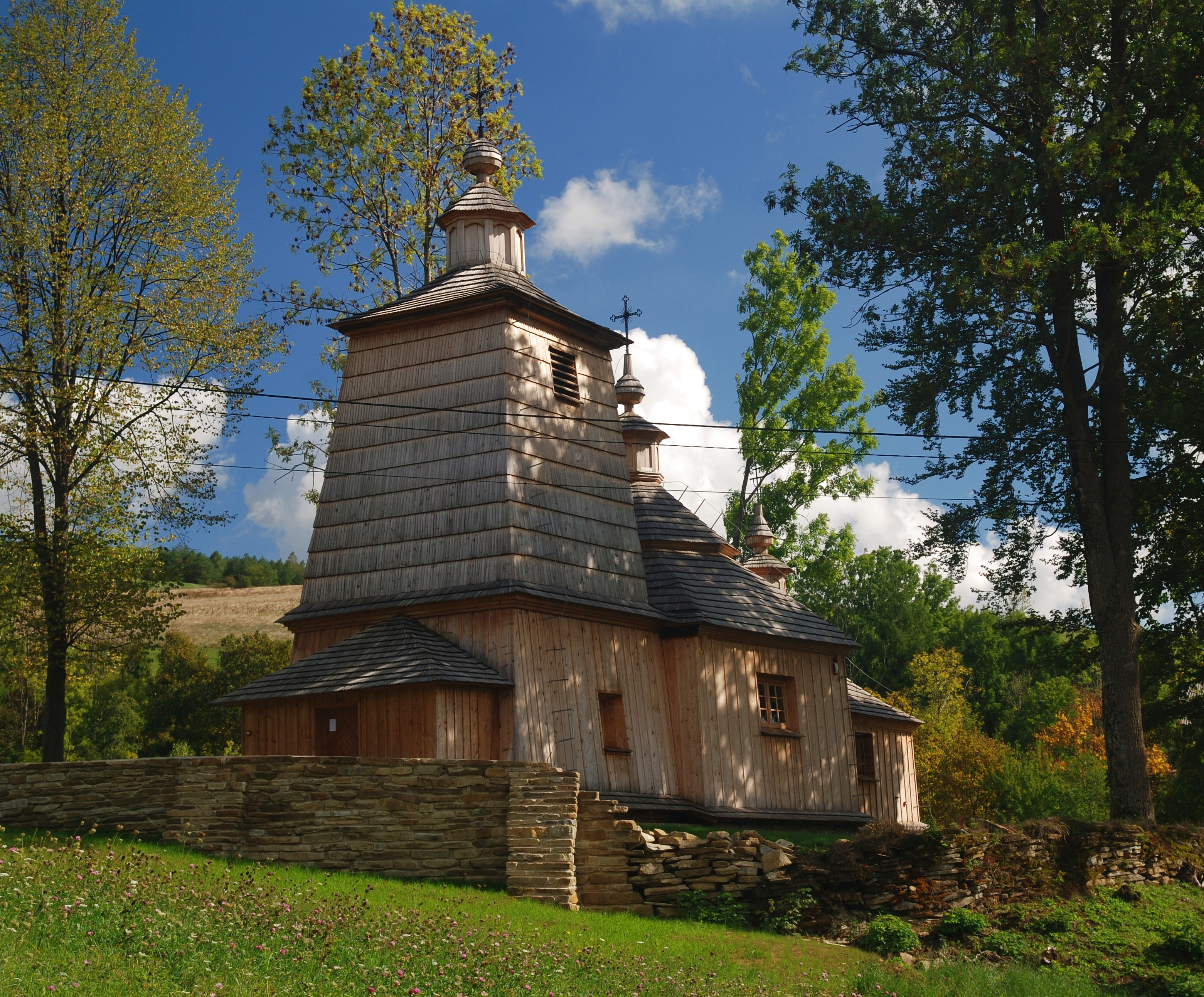 Bałucianka, cerkiew greko-kat., ob. kościół par. p.w. Wniebowzięcia NMP, 2 poł. XVIII